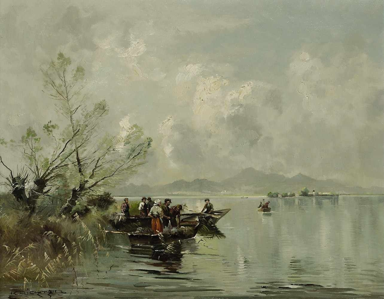 Chiemseefischer